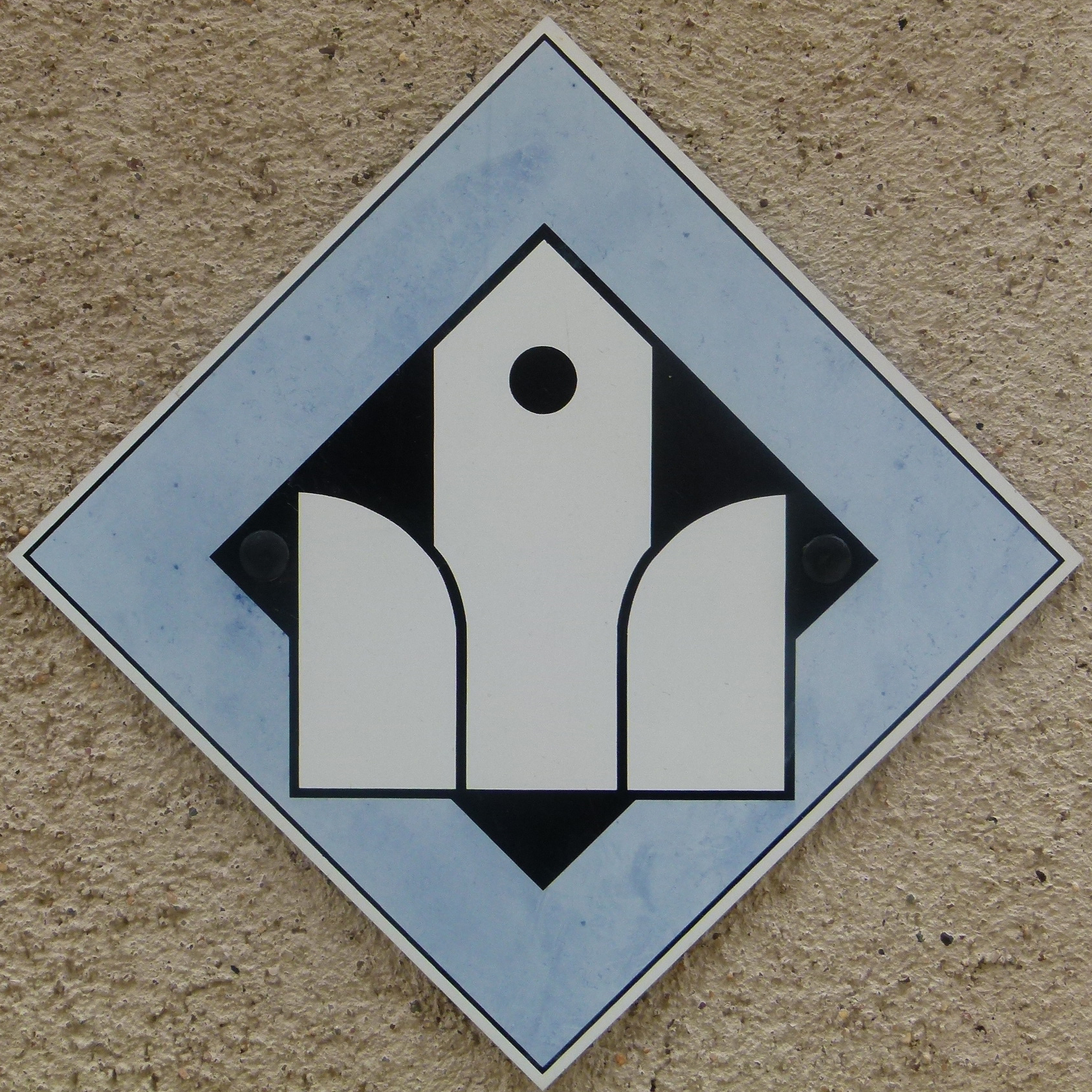 Zeichen der Initiative "Offene Kirchen"